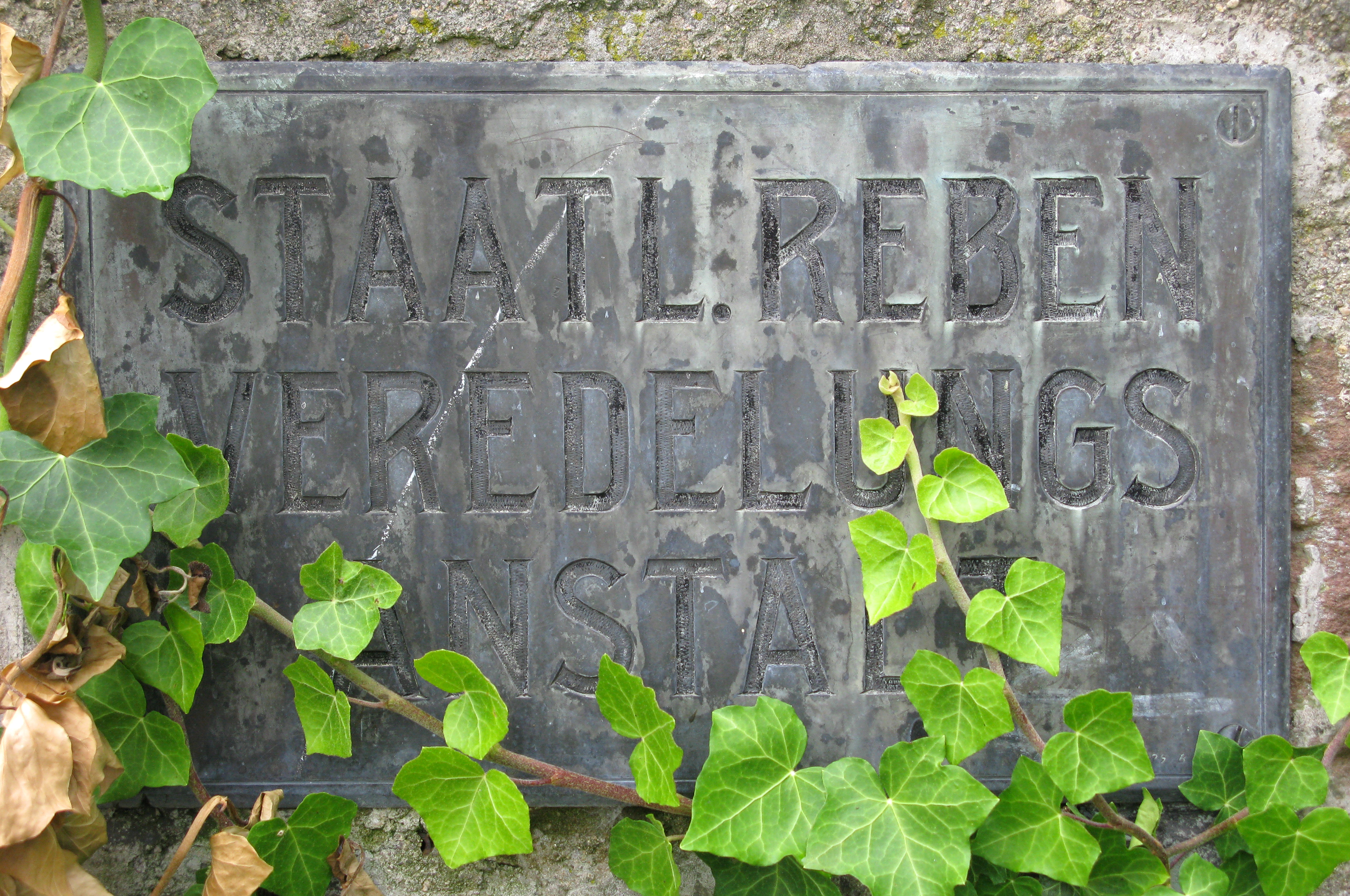 Altbau des Staatlichen Weinbauinstitutes Freiburg, Schild